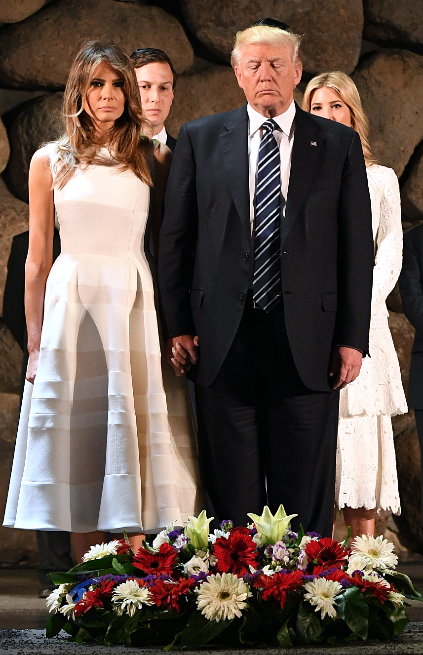 DSC_3922F